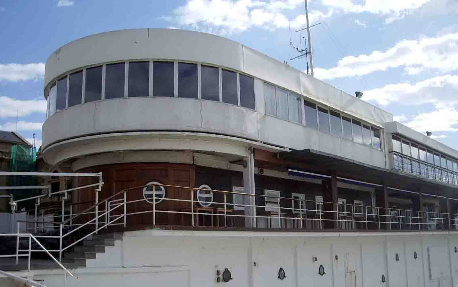 Donostiako Klub Nautikoa, 1929an Aizpurua eta Labaien arkitektoek eraikia, GATEPAC elkarteko kideak.